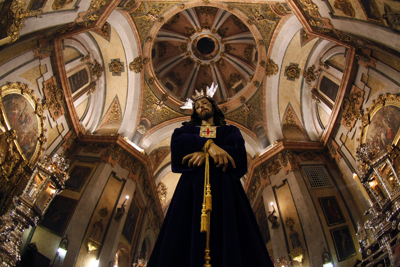 Imagen de Nuestro Padre Jesús del Rescate en la Iglesia de la Magdalena, en la Semana Santa de 2009. Granada (España).